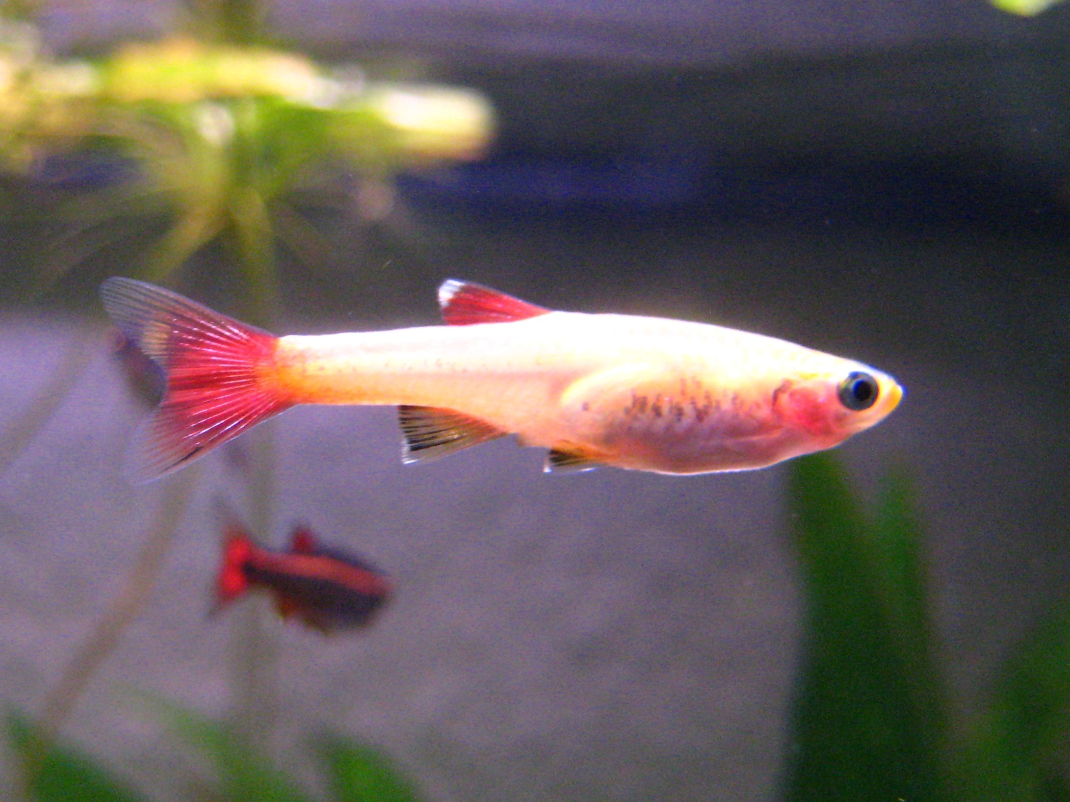 Kardinalfisch, goldene Zuchtform (Tanichthys albonubes gold)